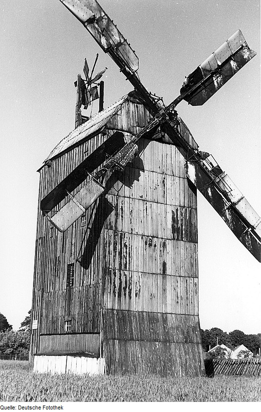 Original image description from the Deutsche FotothekAm Mellensee-Saalow. Paltrockmühle